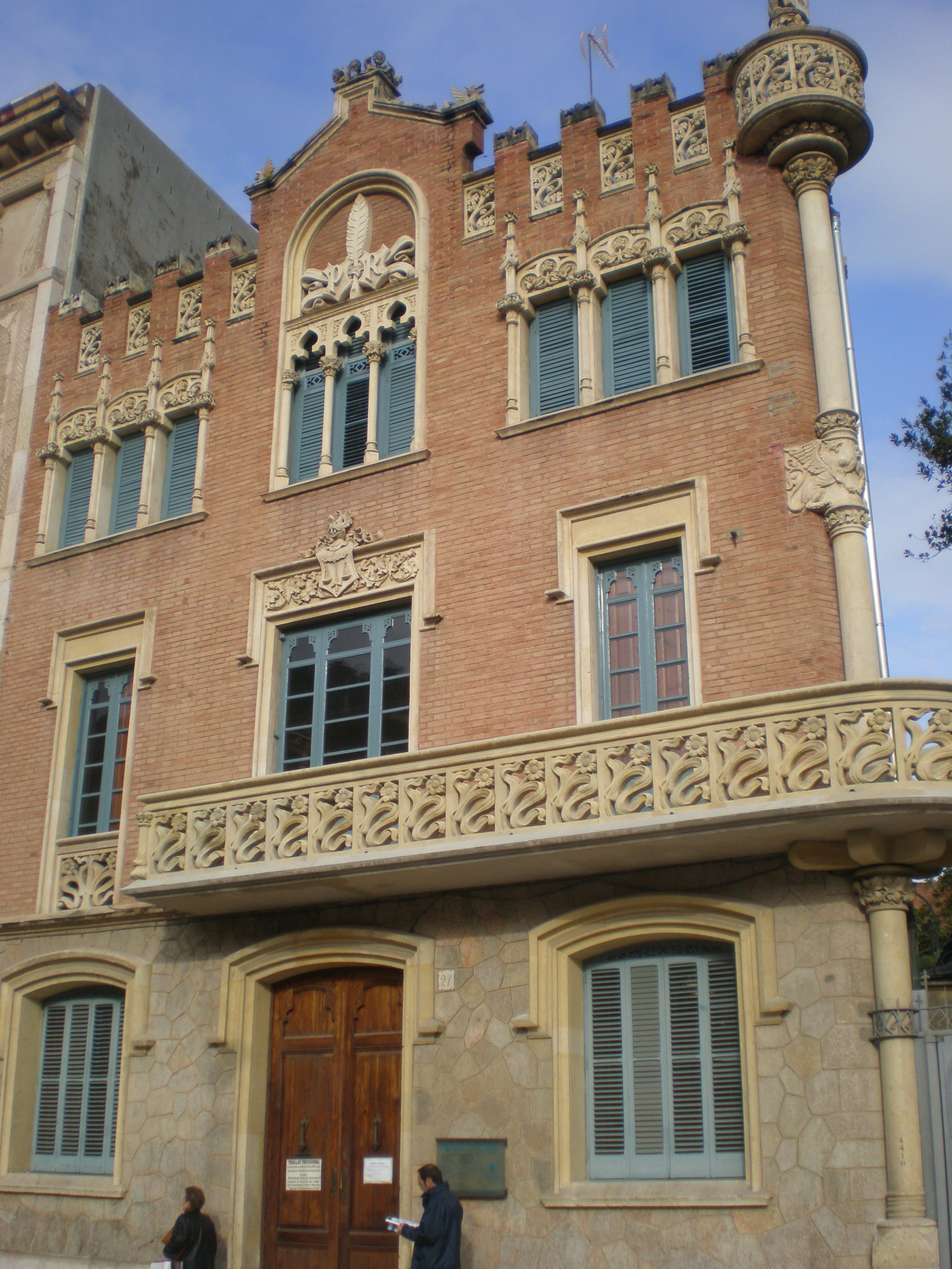 Casa Rull, a Reus (Baix Camp), obra de Lluís Domènech i Montaner del 1900 projectada per al notari Pere Rull.